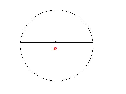 Bir çap örneği.